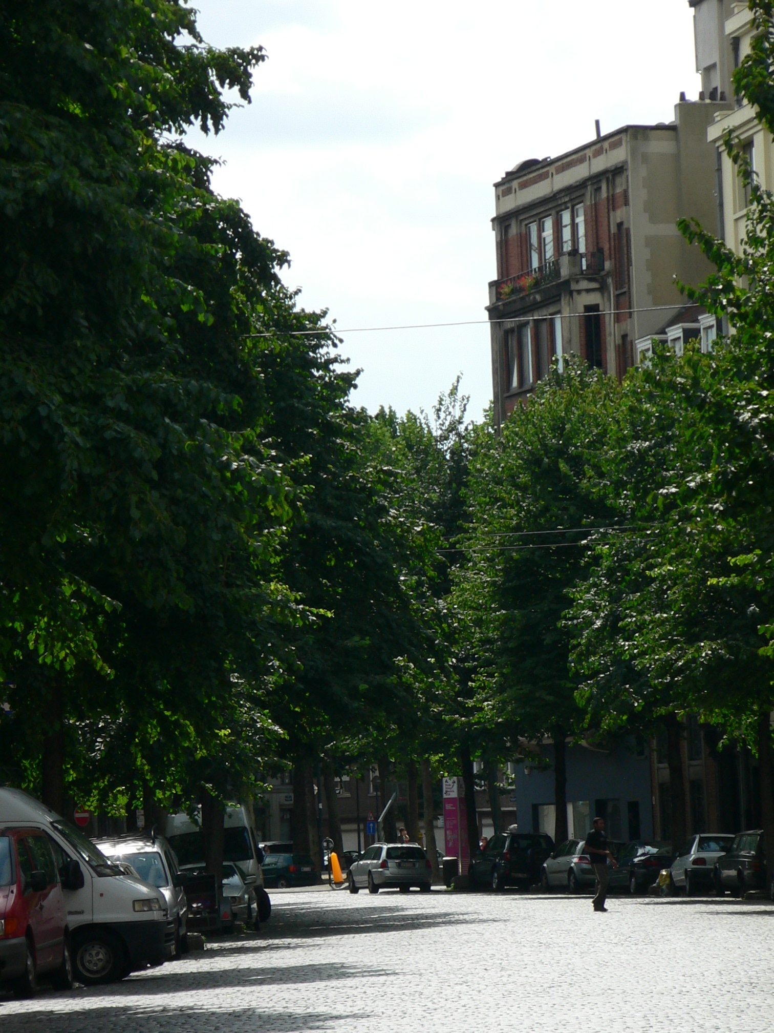 Moi E Poulsen, auteur de cette photo cède tous les droits à la fondation Wikimedia et Wikipedia. Photo entièrement libre